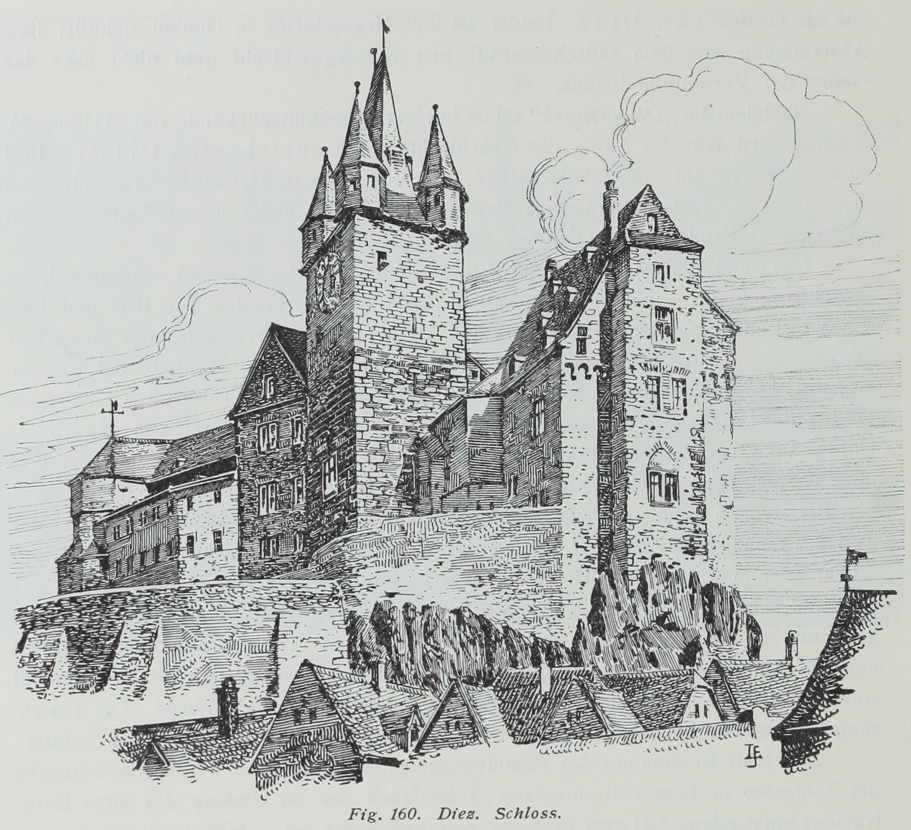 Diez Schloss